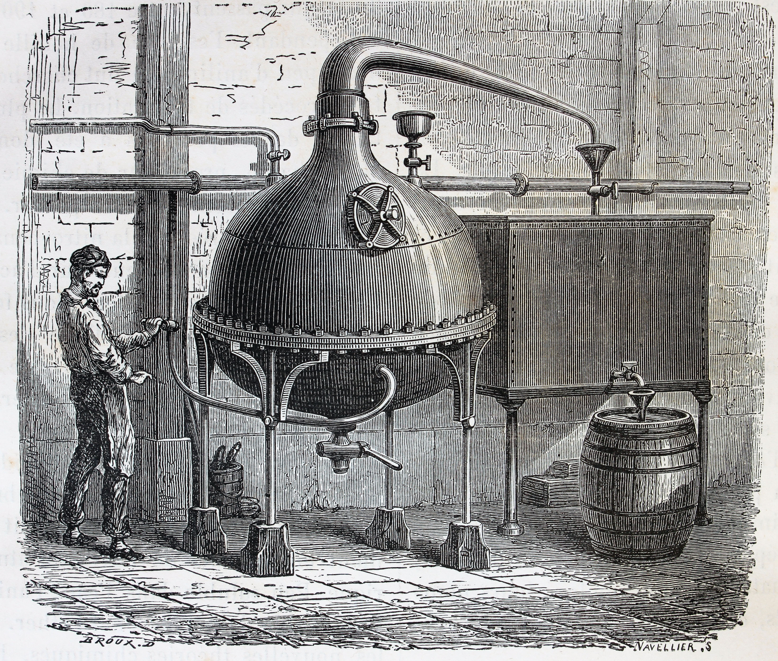 Ilustraciones de la obra : Les merveilles de l'industrie ou, Description des principales industries modernes / par Louis Figuier. - Paris : Furne, Jouvet, [1873-1877]. - Tome II